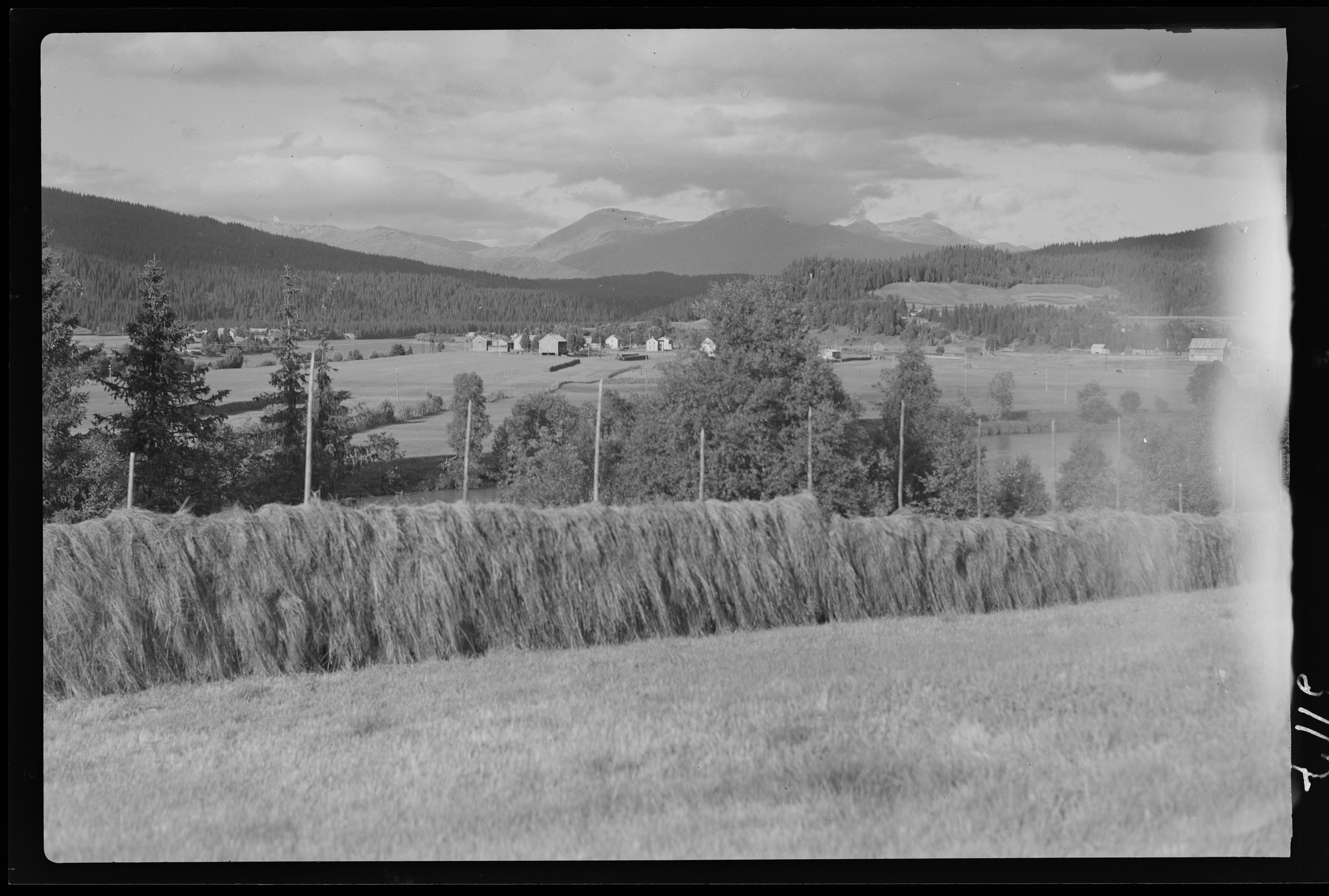 Bildet er hentet fra Nasjonalbibliotekets bildesamling. Anmerkninger til bildet var: Fotograf : ukjent Skonseng - tatt fra Elsebakken Skonseng, Rana, Nordland